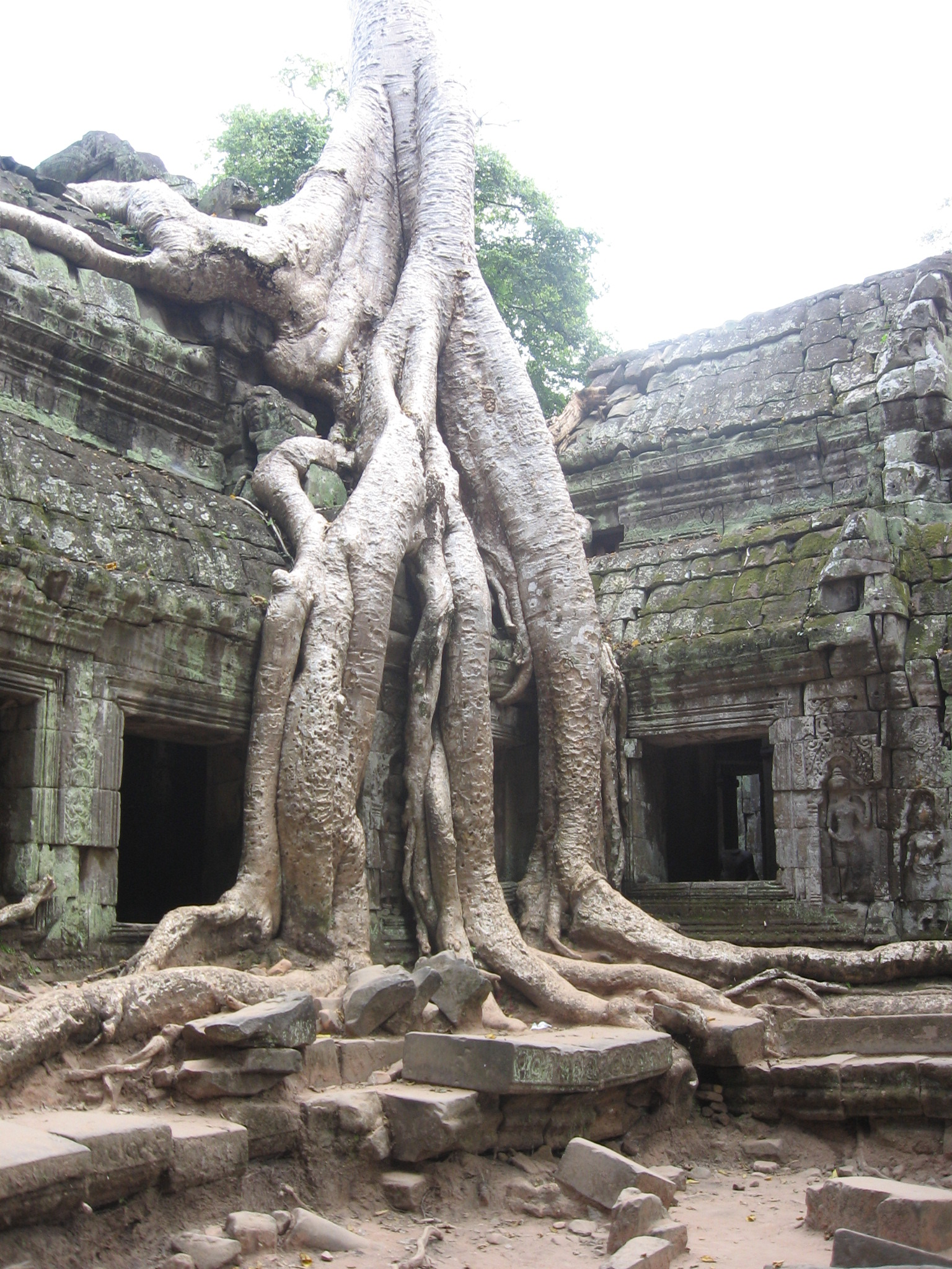 Ta Prohm, Angkor